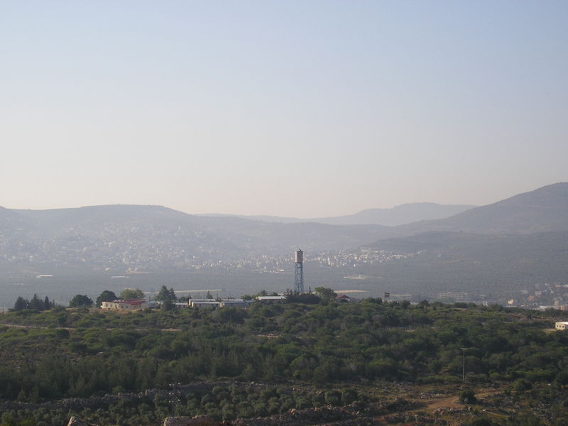 קיבוץ אשבל. צולם על ידי